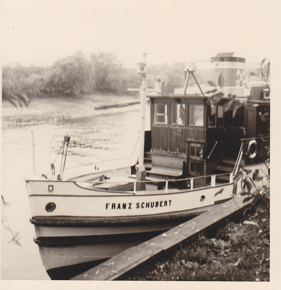 MS Franz Schubert, 1939 Stapellauf, 1940-1963 im Einsatz der HBEL zwischen Blankenese und Cranz, von 1963 weiter dort im Einsatz durch die HADAG. November 1974 an eine Privatperson verkauft. Aufnahme Frühjahr 1973 in Cranz.